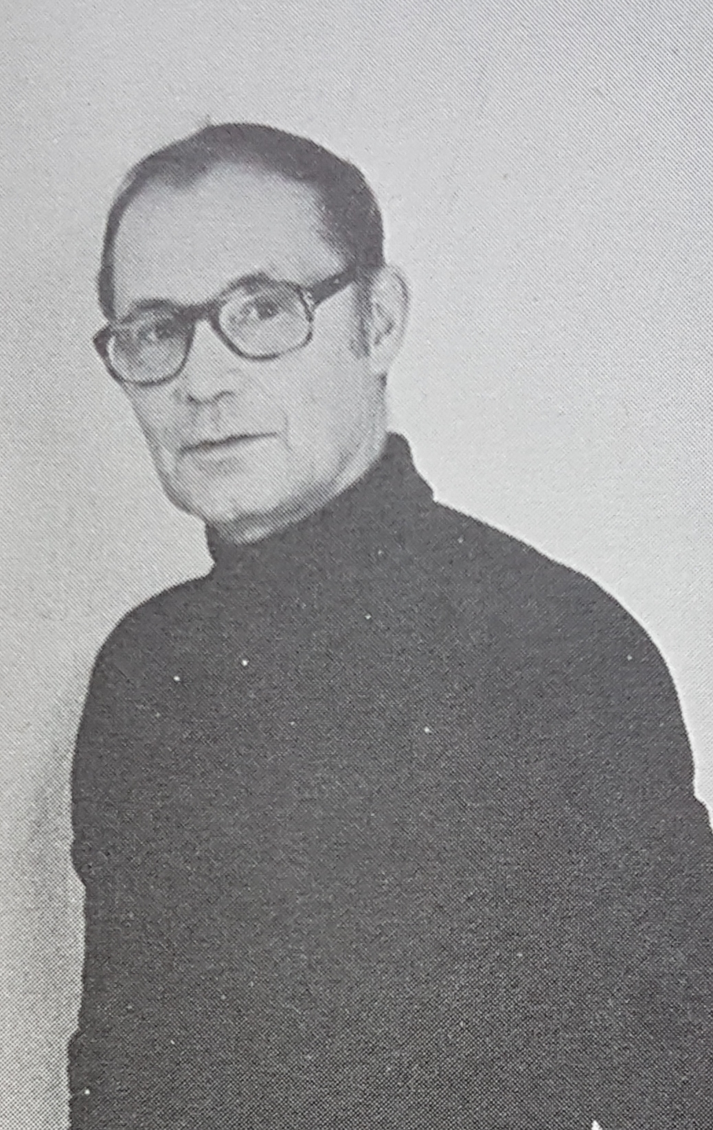 Helmer Forslund Artist.from Sweden